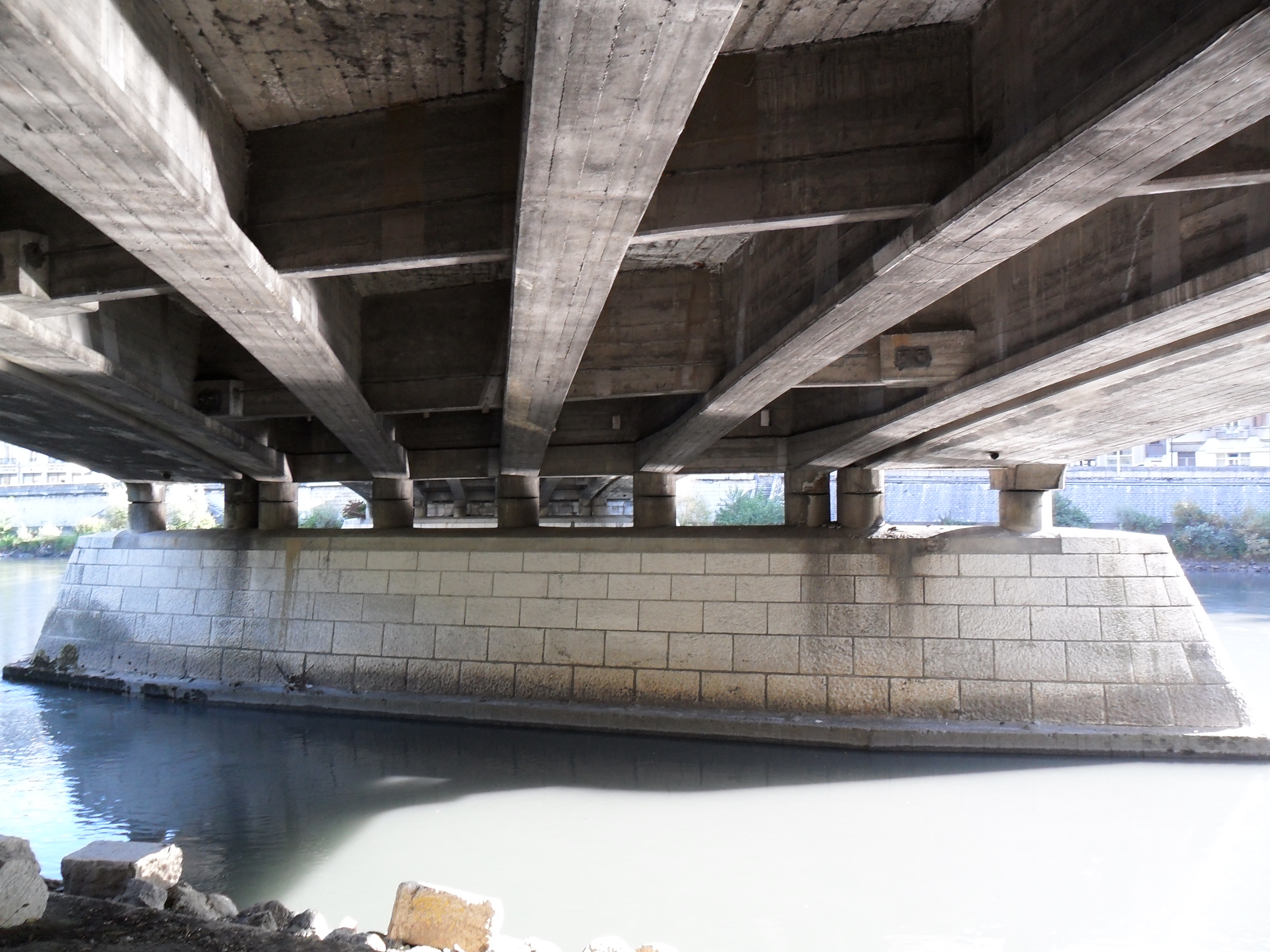 Pile rive droite du pont. On peut voir les biellettes en béton armé sous les poutres et les caissons, ainsi que les entretoises.